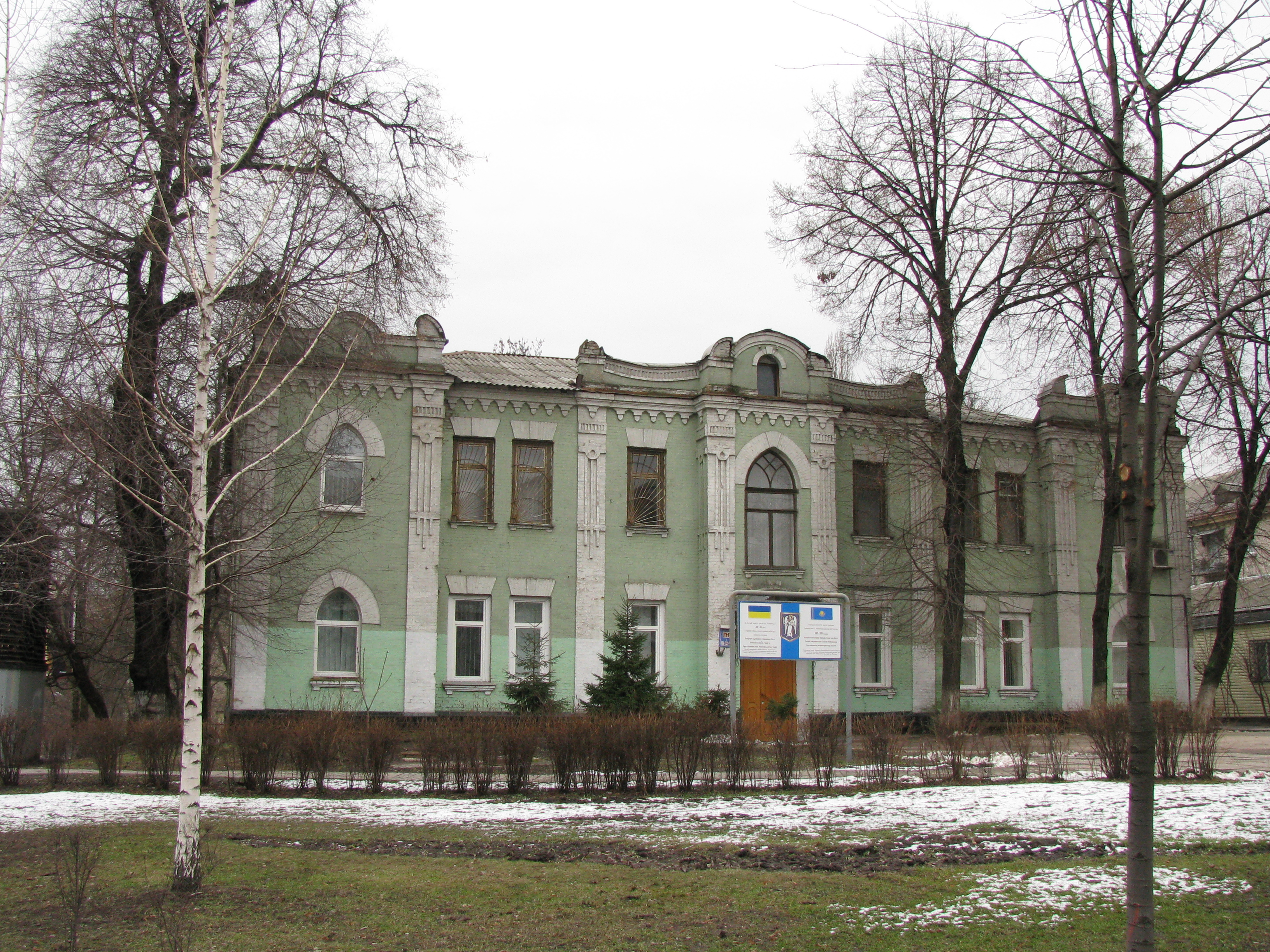 Будинок житловий (пам'ятка знесена для будівництва посольства) Юрія Іллєнка вул., 51